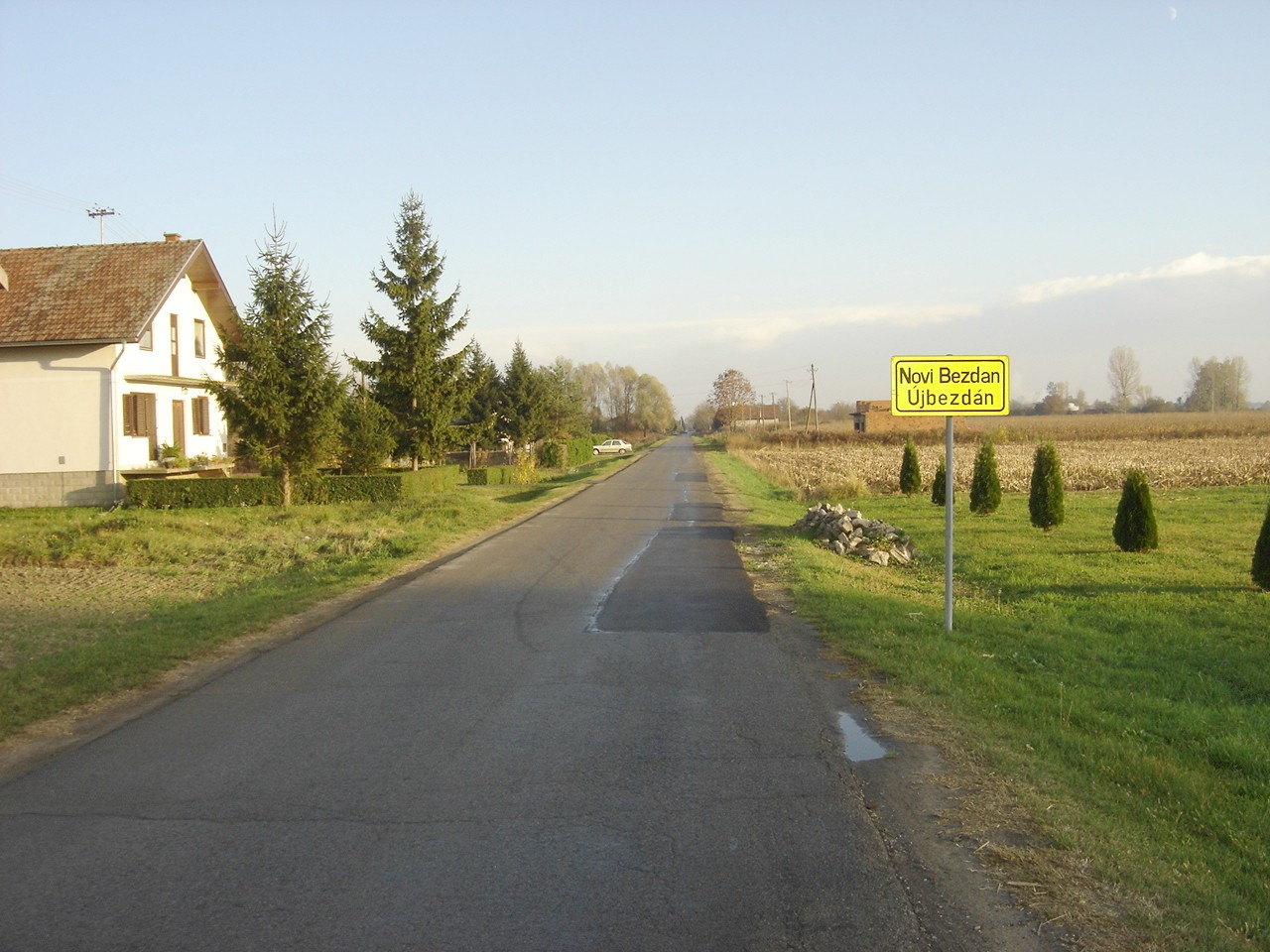 Županijska cesta Ž4040 u Baranji (Novi Bezdan)